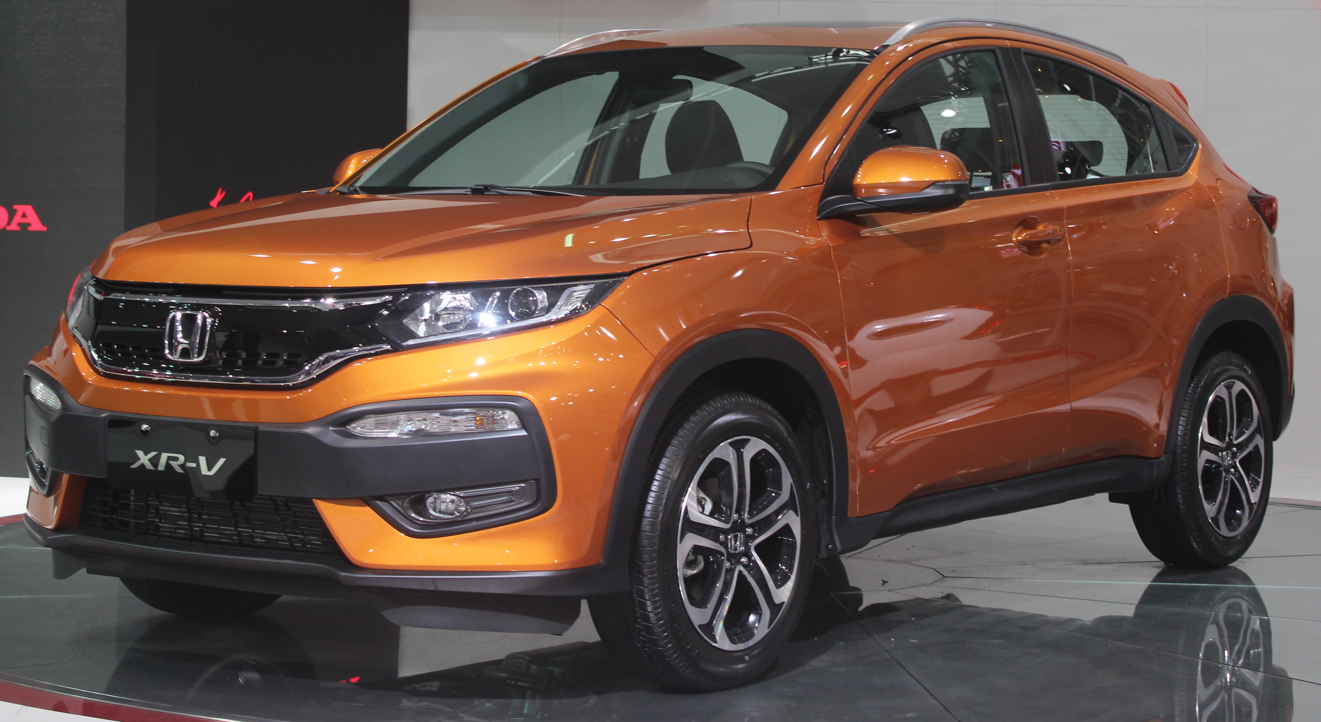 东风本田XR-V于2014年广州车展